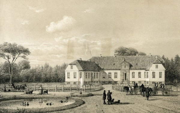 Lerbæk Gods i Hover sogn. Litografi fra 1854.